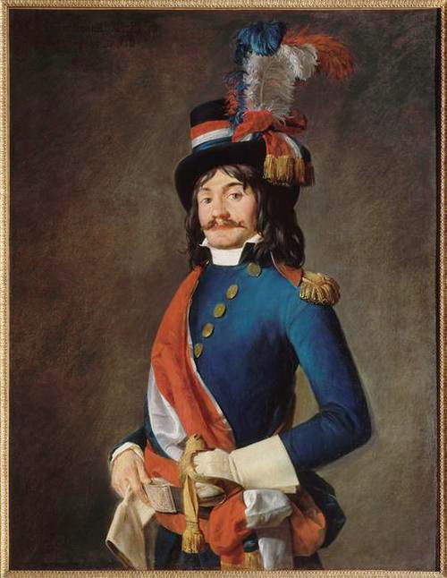 Jean Baptiste Milhaud, député de la convention, dans son uniforme de représentant du peuple aux armées